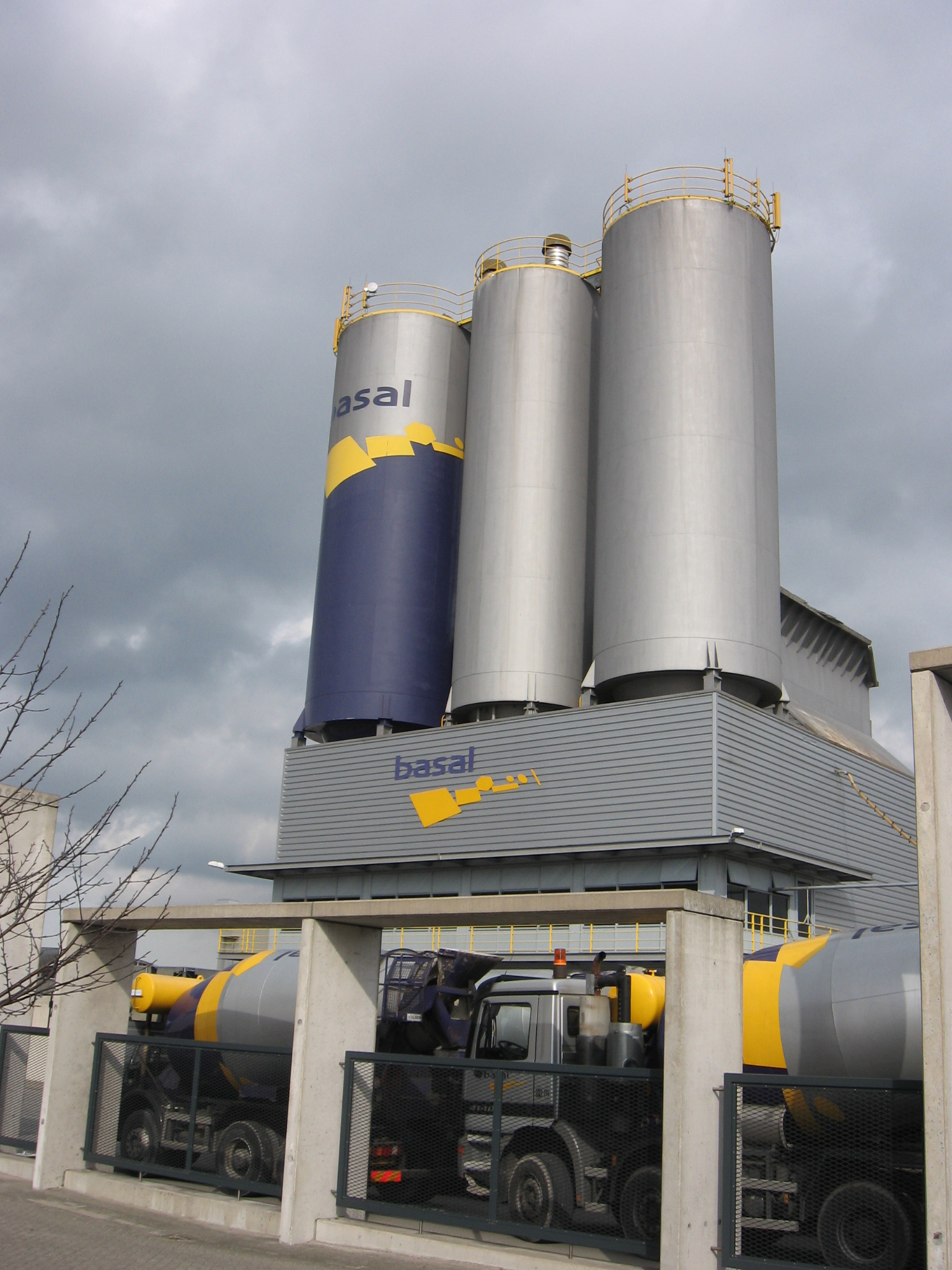 Basal - Den Haag